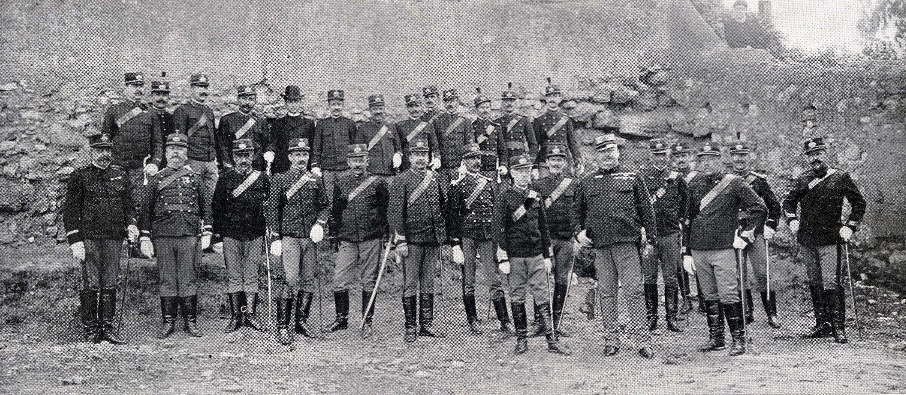 O Rei D Carlos I no regimento de infantaria 16 - 15 de Maio de 1907